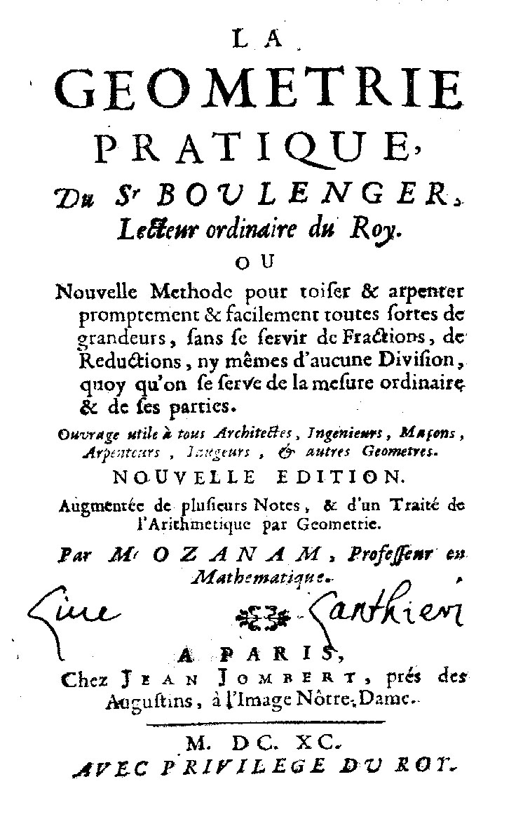 La geometrie pratique, du sr Boulenger, lecteur ordinaire du roy. Ou Nouvelle methode pour toiser & arpenter promptement & facilment toutes sortes de grandeurs ... Augmentée de plusieurs Notes, & d'un Traité de l'Arithmetique par Geometrie. Par Mr Ozanam ... . - A Paris : chez Jean Jombert, prés des Augustins, à l'Image Nôtre-Dame, 1690. - [8], 422, [2] p. : ill. ; 8º .